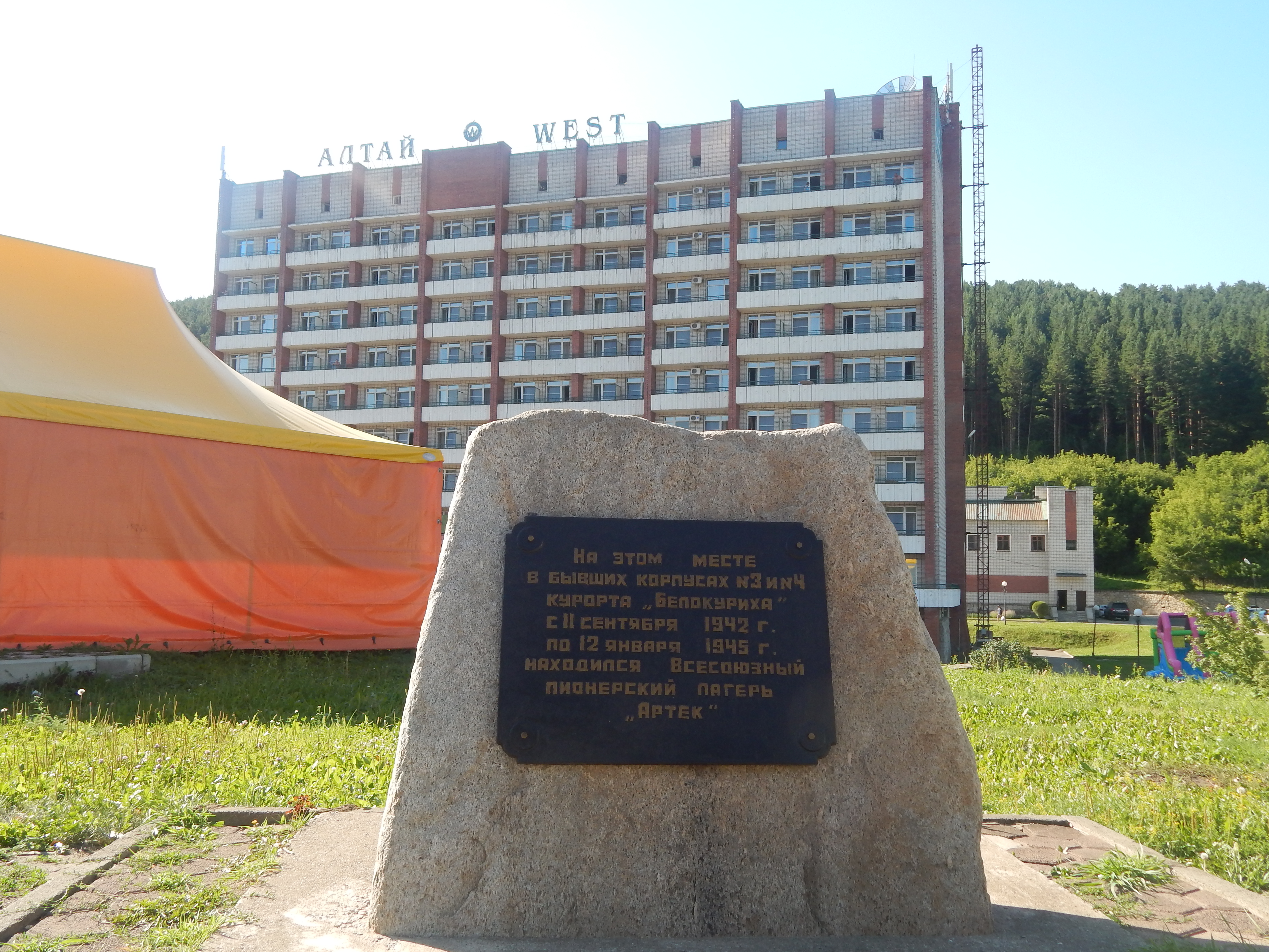 Памятный знак на месте, где в годы Великой Отечественной войны находился лагерь «Артек»: улица Славского, 37/1 (территория курорта), Белокуриха, Алтайский край